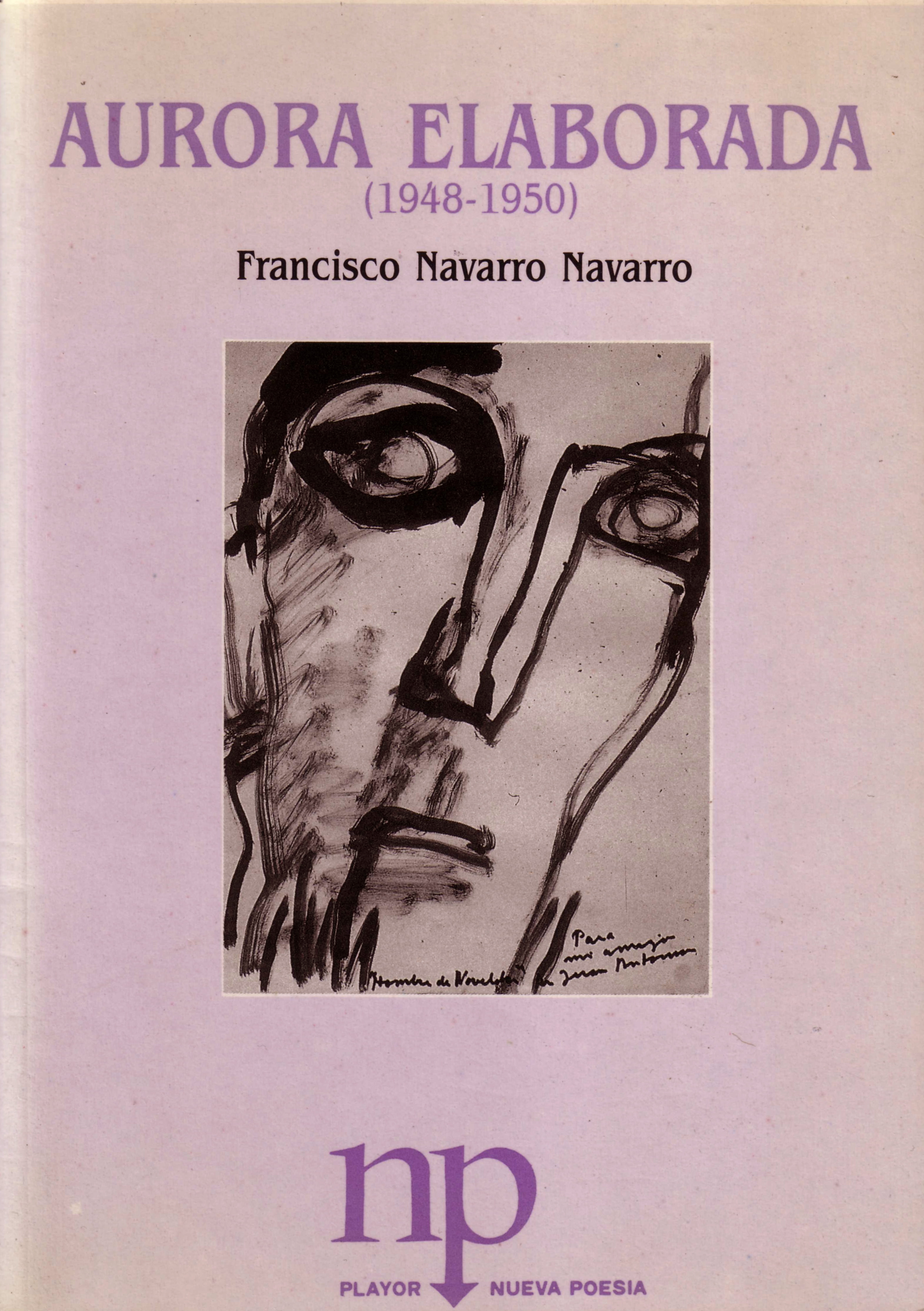 Portada del libro "Aurora elaborada" de Francisco Navarro Navarro. Reedición de Editorial Playor, 1990.